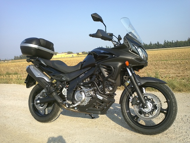 v-strom 2012 laterale